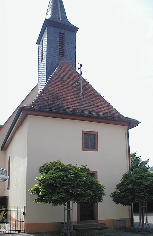 Kath. Kirche in Östringen-Eichelberg